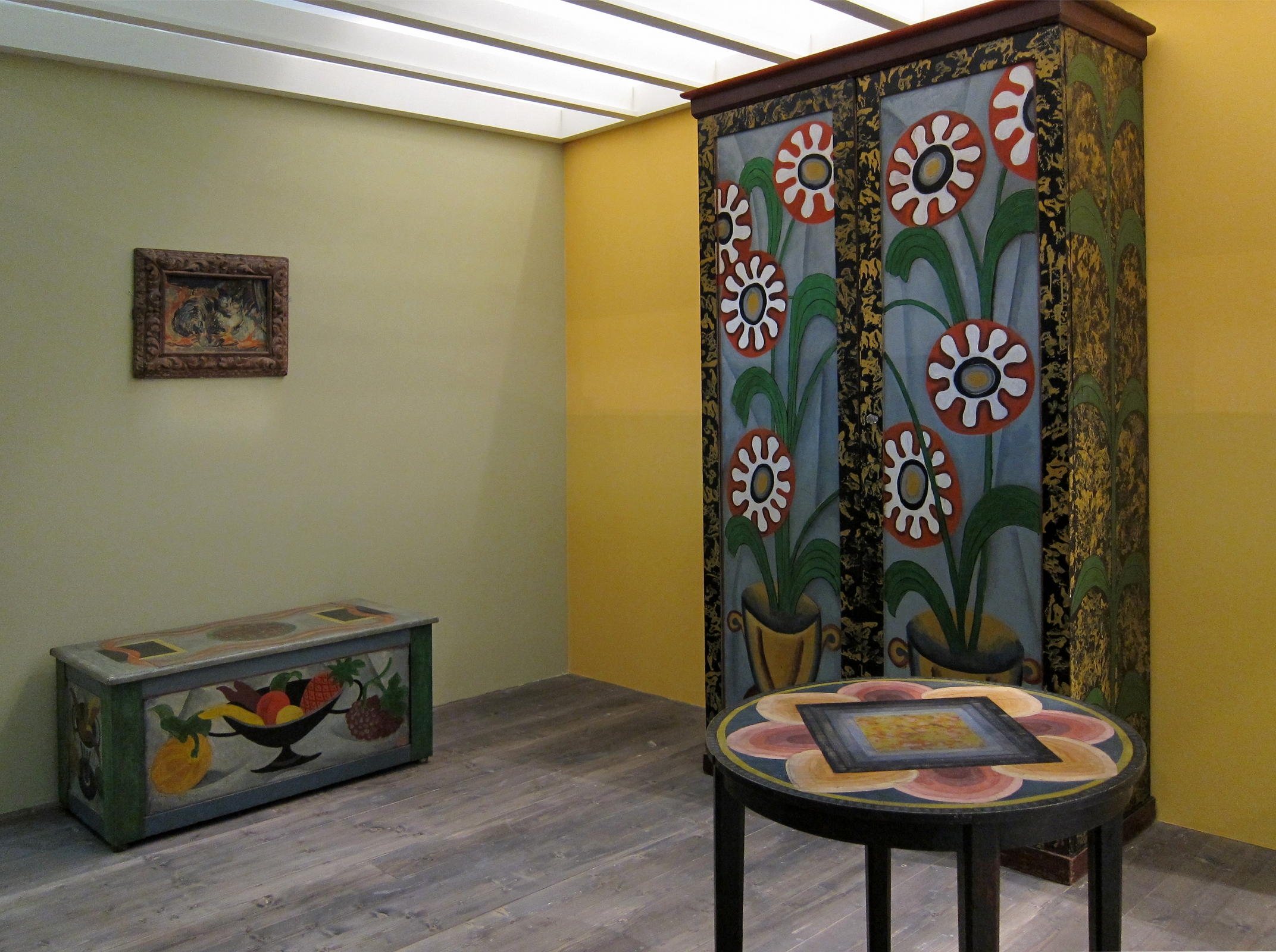 Mobilier de Roger Fry pour les Omega Workshops présentés à l'exposition Bloomsbury au musée d'art et d'industrie de Roubaix (Nord), 21 novembre 2009-28 février 2010